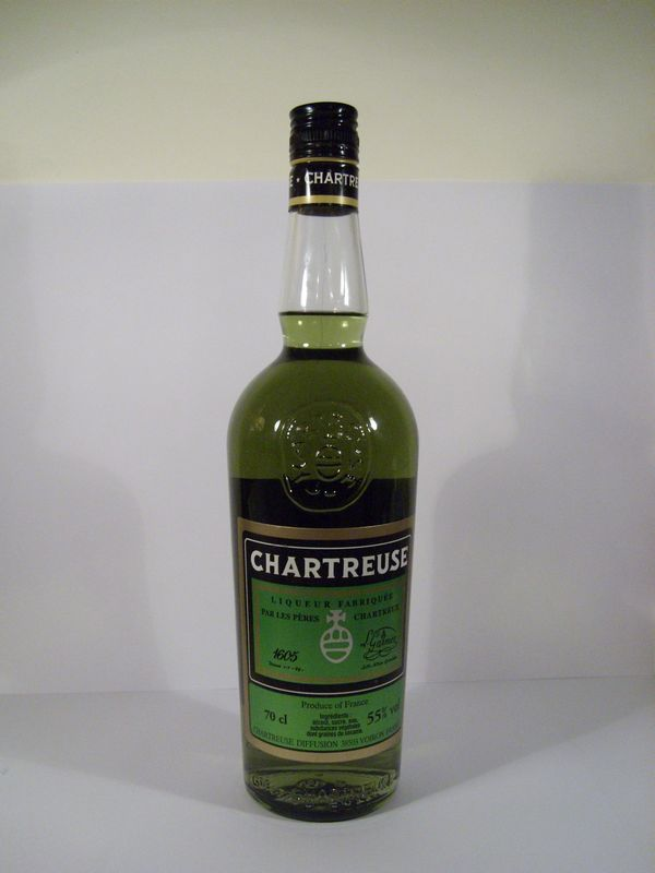 bouteille de chartreuse verte